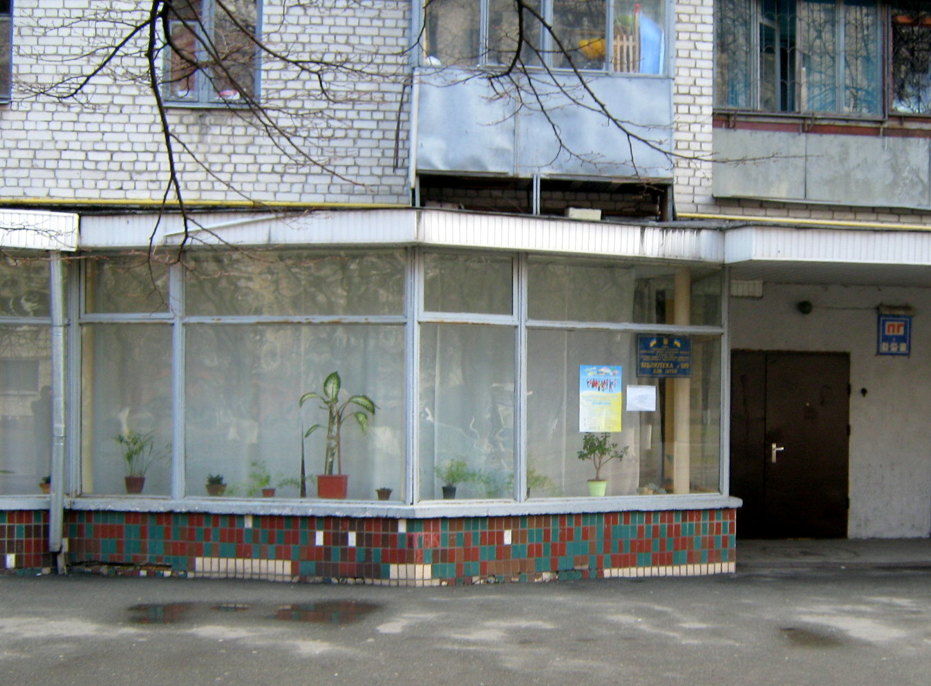 Бібліотека №120 для дітей в Києві